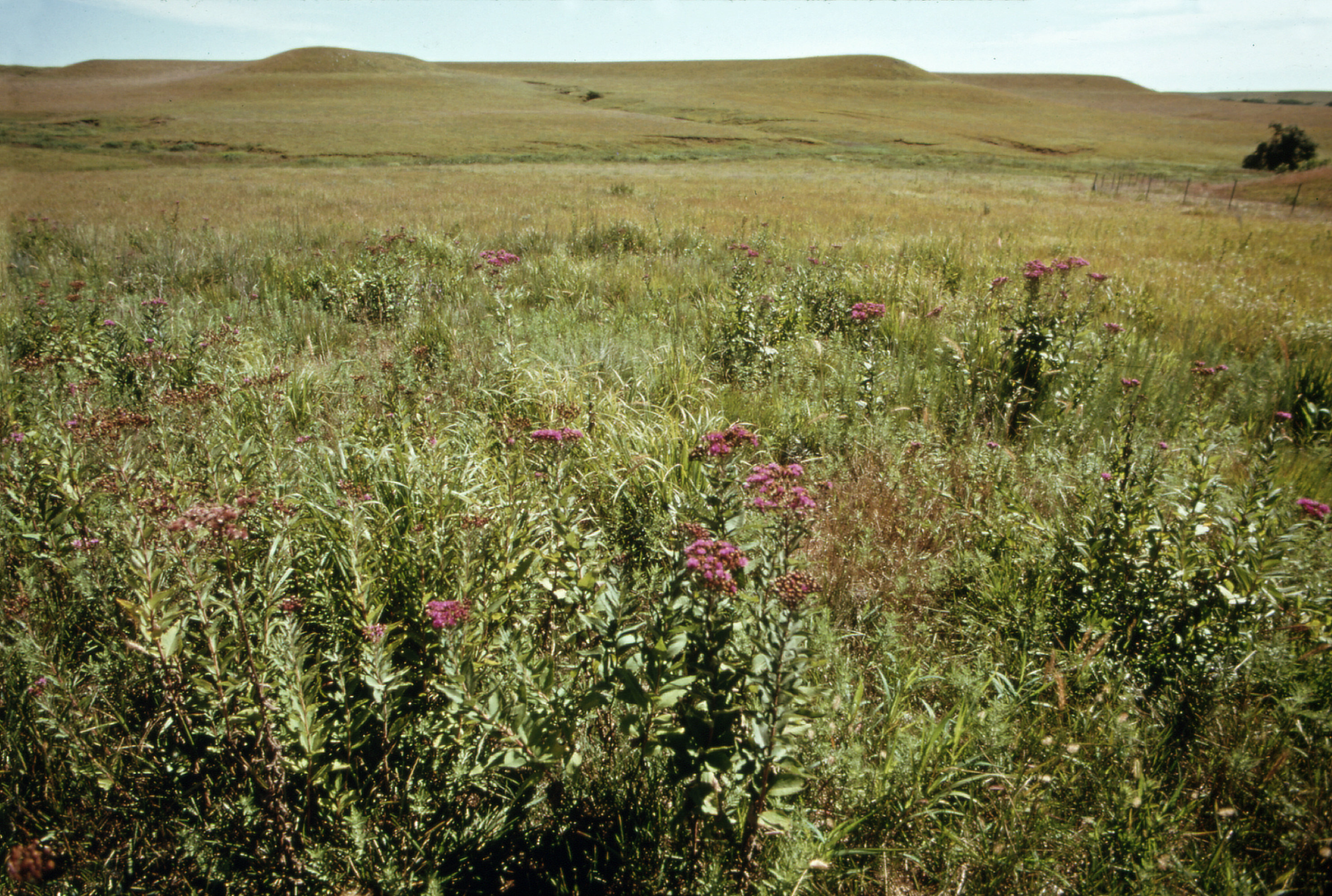 Ein Ausschnitt der Konza Prairie, knapp 3500 ha von Ackernutzung unberührter Hochgras-Prärie in der Nähe von Manhattan, Kansas. Obwohl das Bild im August 1974, während eines extrem trockenen Sommers aufgenommen wurde, blieb die Prärie der tiefen Wurzeln des Grases wegen grün. File:A VIEW OF A PORTION OF KONZA PRAIRIE, 1,000 ACRES OF VIRGIN TALLGRASS PRAIRIE NEAR MANHATTAN, KANSAS - NARA - 557189.jpg File:A VIEW OF A PORTION OF KONZA PRAIRIE, 1,000 ACRES OF VIRGIN TALLGRASS PRAIRIE NEAR MANHATTAN, KANSAS - NARA - 557189.tif